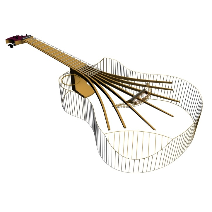 Dessin 3d Manche Intégral